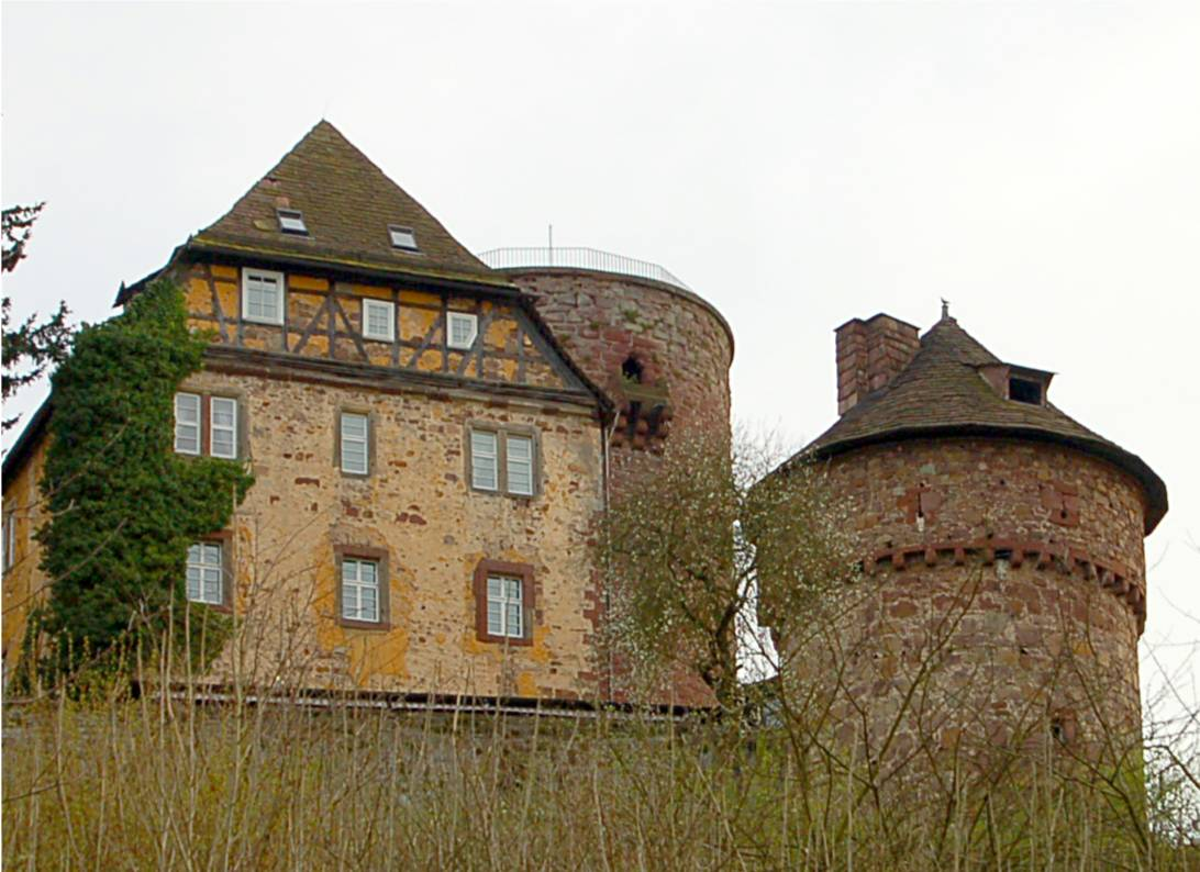 Die Trendelburg